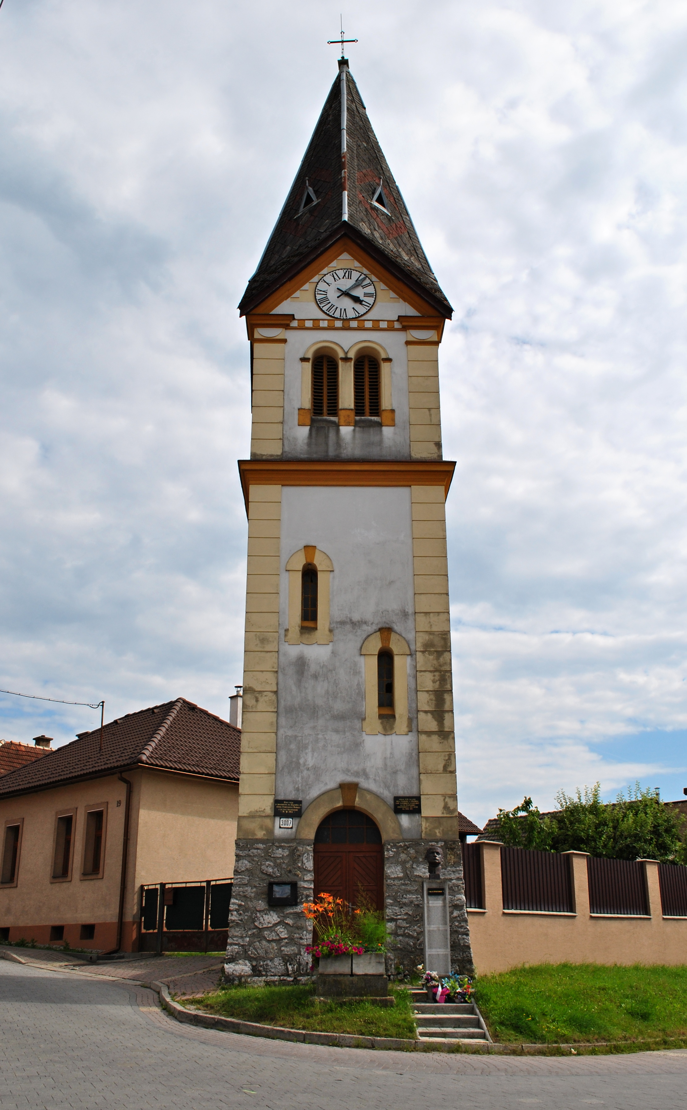 Sásová, mestská časť Banskej Bystrice - hodinová veža z roku 1913